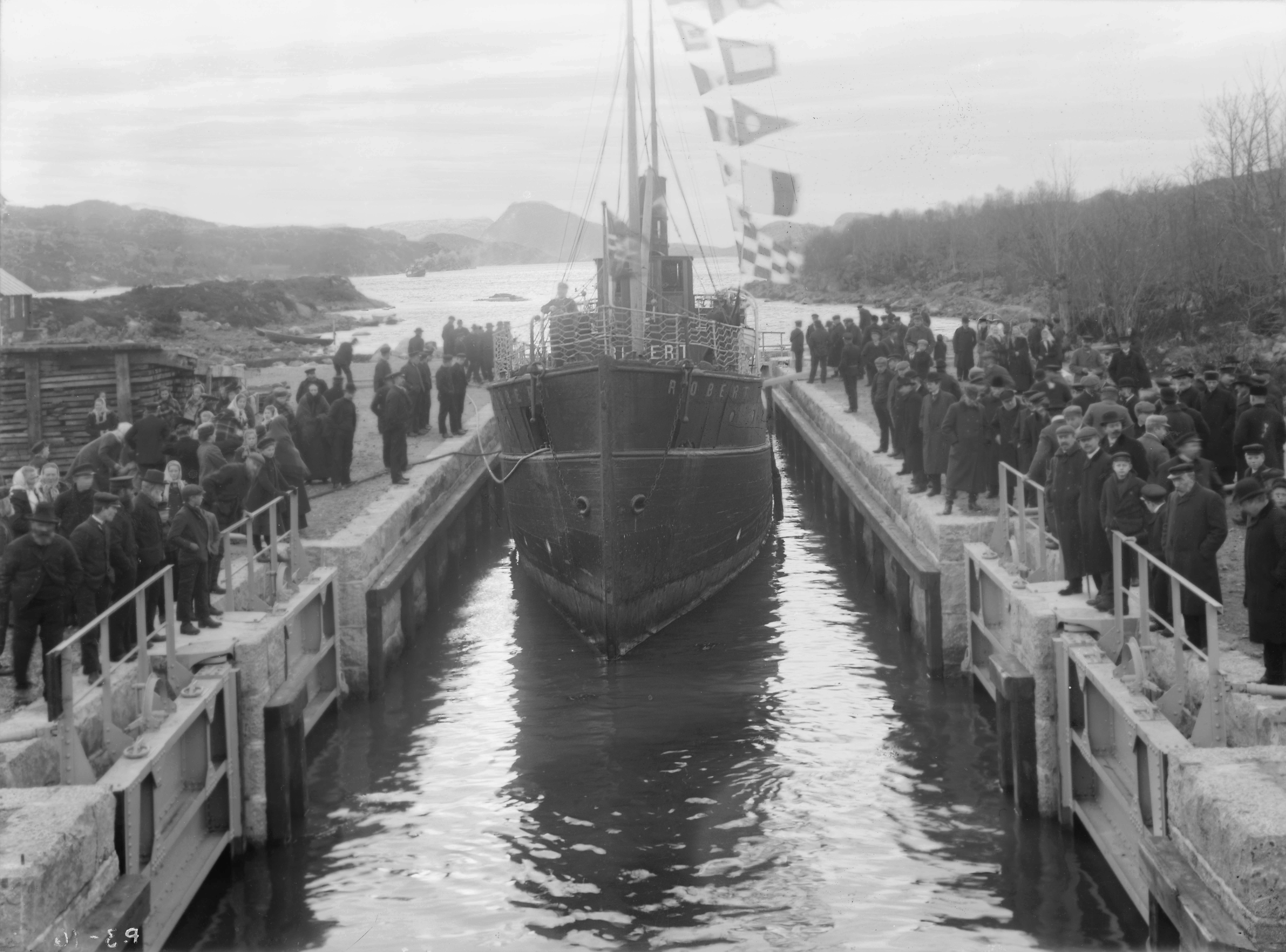 Bildet er hentet fra Arkivverket. Åpning av Skjoldastraumen sluser i 1908. Arkivinstitusjon : Riksarkivet Arkivnavn : Havnedirektoratet Sted : Norge, Rogaland, Tysvær, Emneord: Sluser, Båter Avbildet